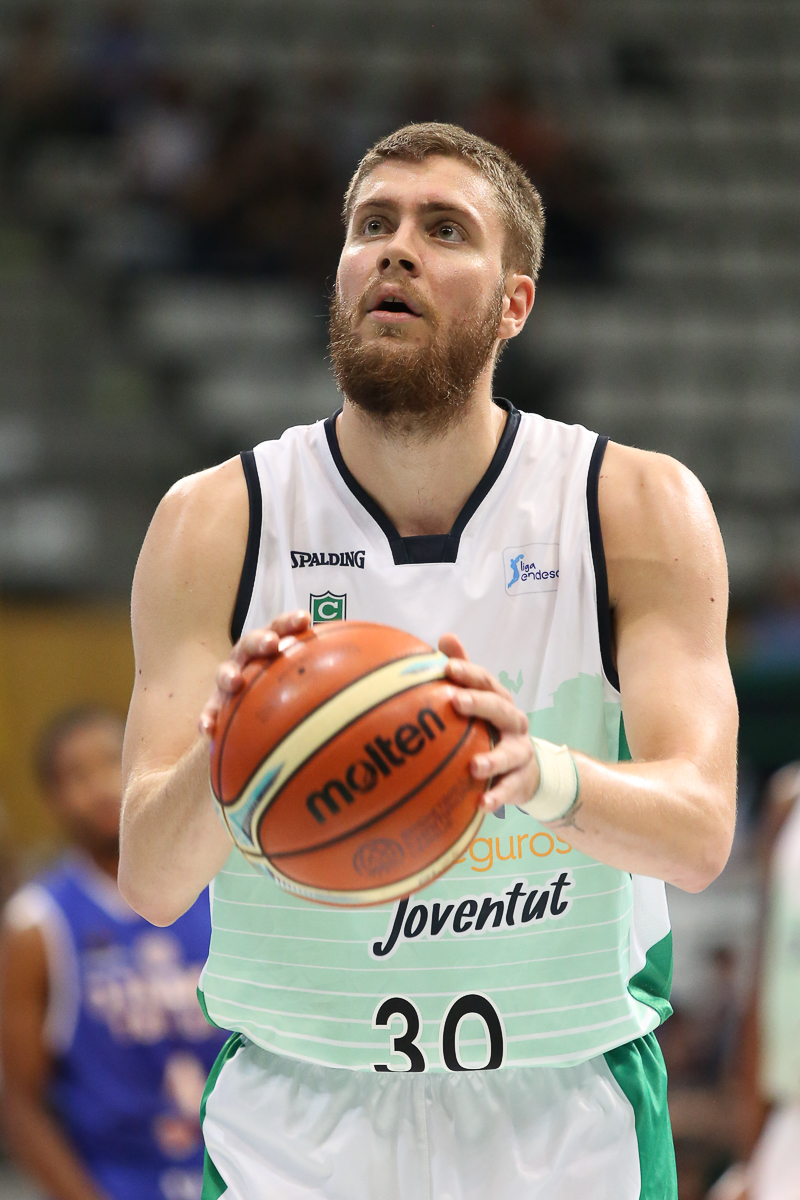 Dominik Mavra amb la samarreta del Joventut de Badalona en la temporada 2017-18.